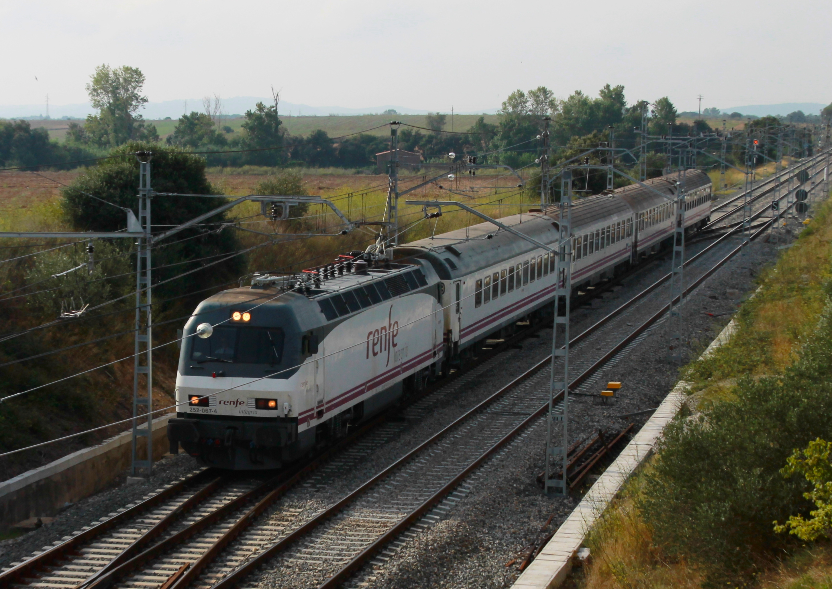 Estrella Costa Brava a su paso por Vilamalla con la locomotora 252-067 de Renfe Integria.